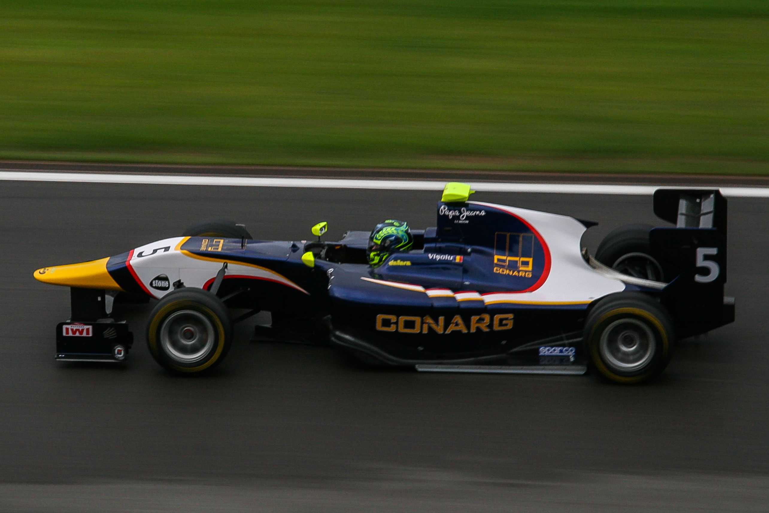 Robert Vișoiu beim Sprintrennen der GP3-Serie in Spa-Francorchamps 2013.